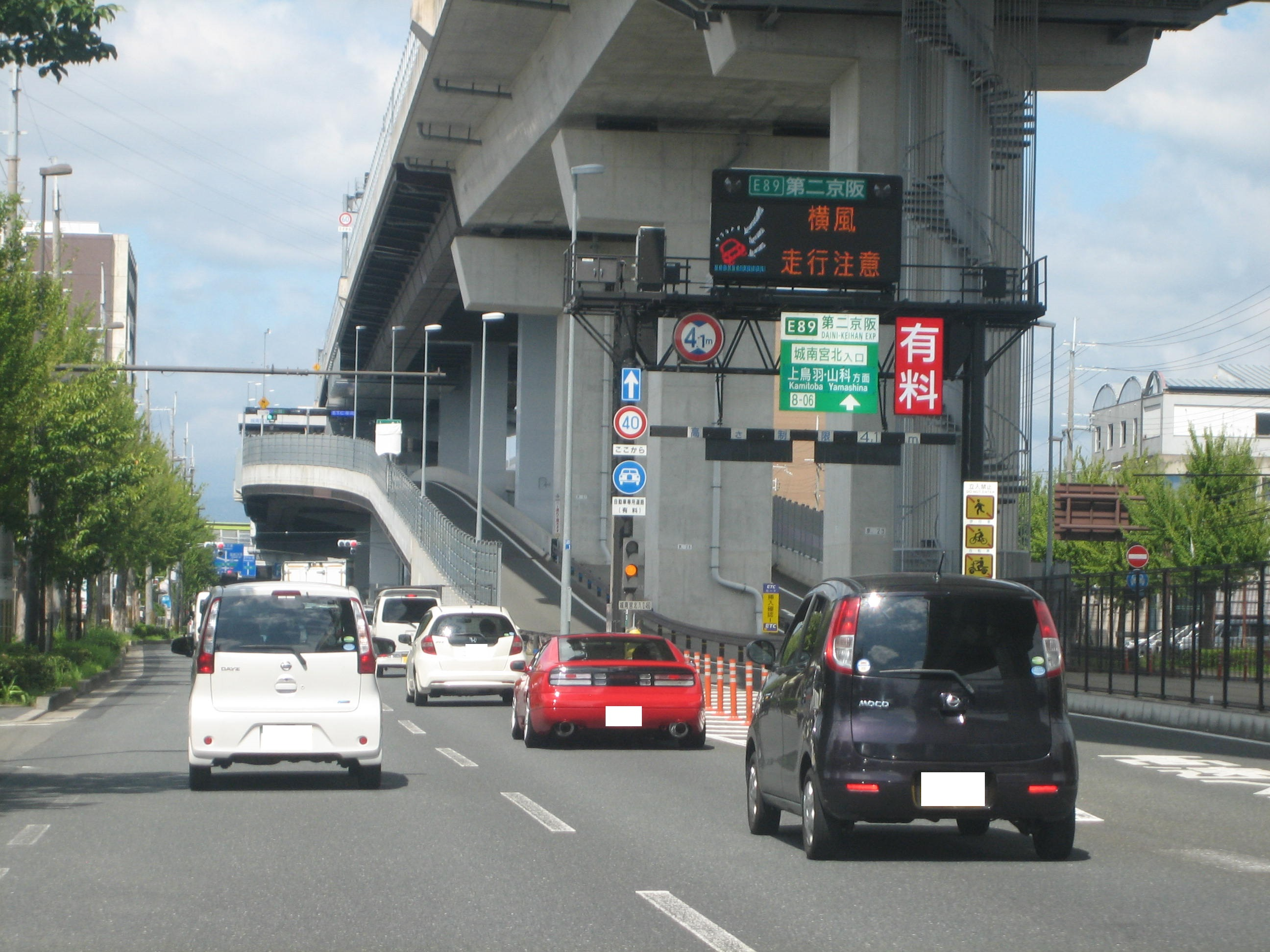 城南宮北入口